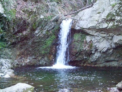 Torrente Pora verso monte (località "Ferrera")